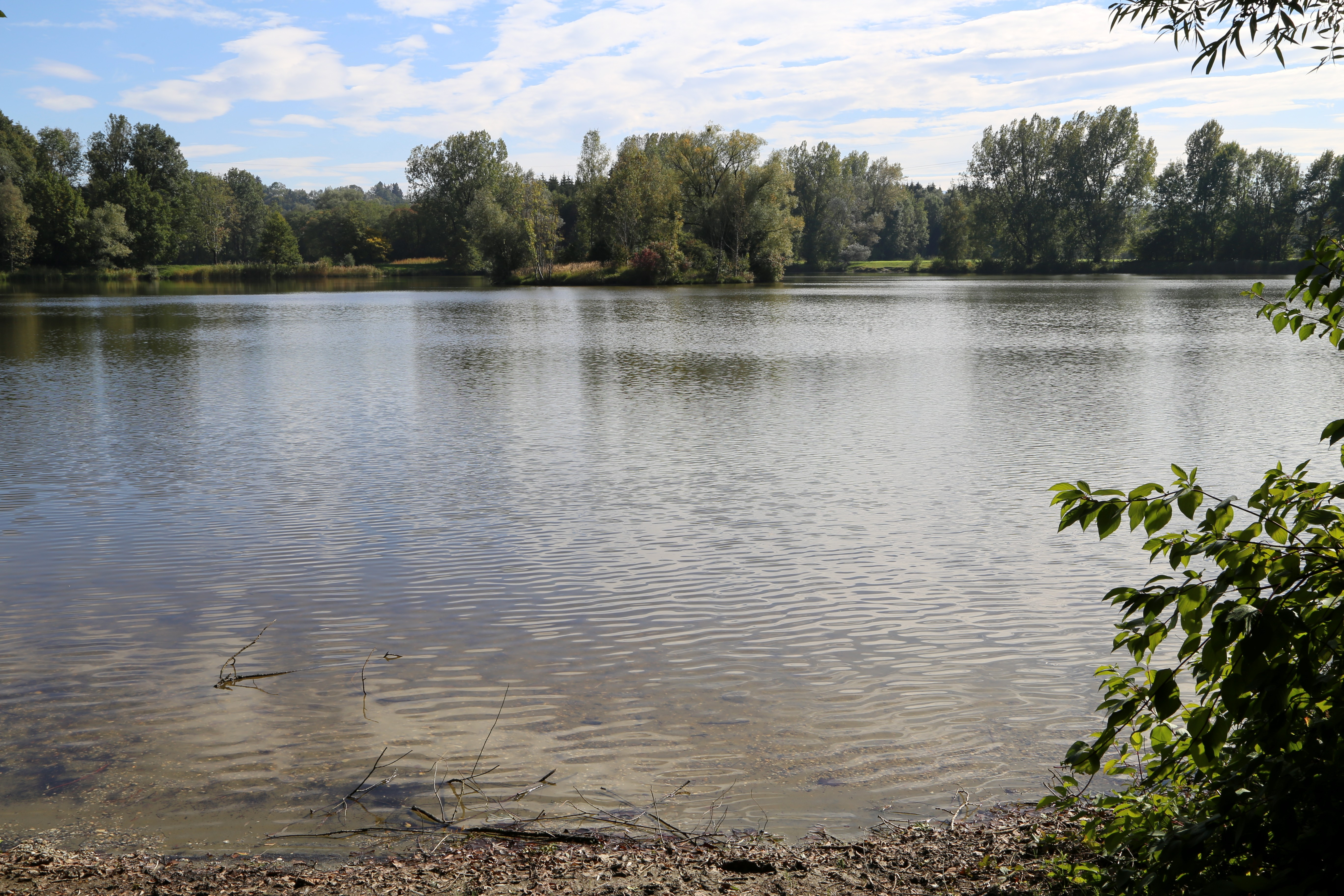 Erlensee, Schechen LSG-00535.01